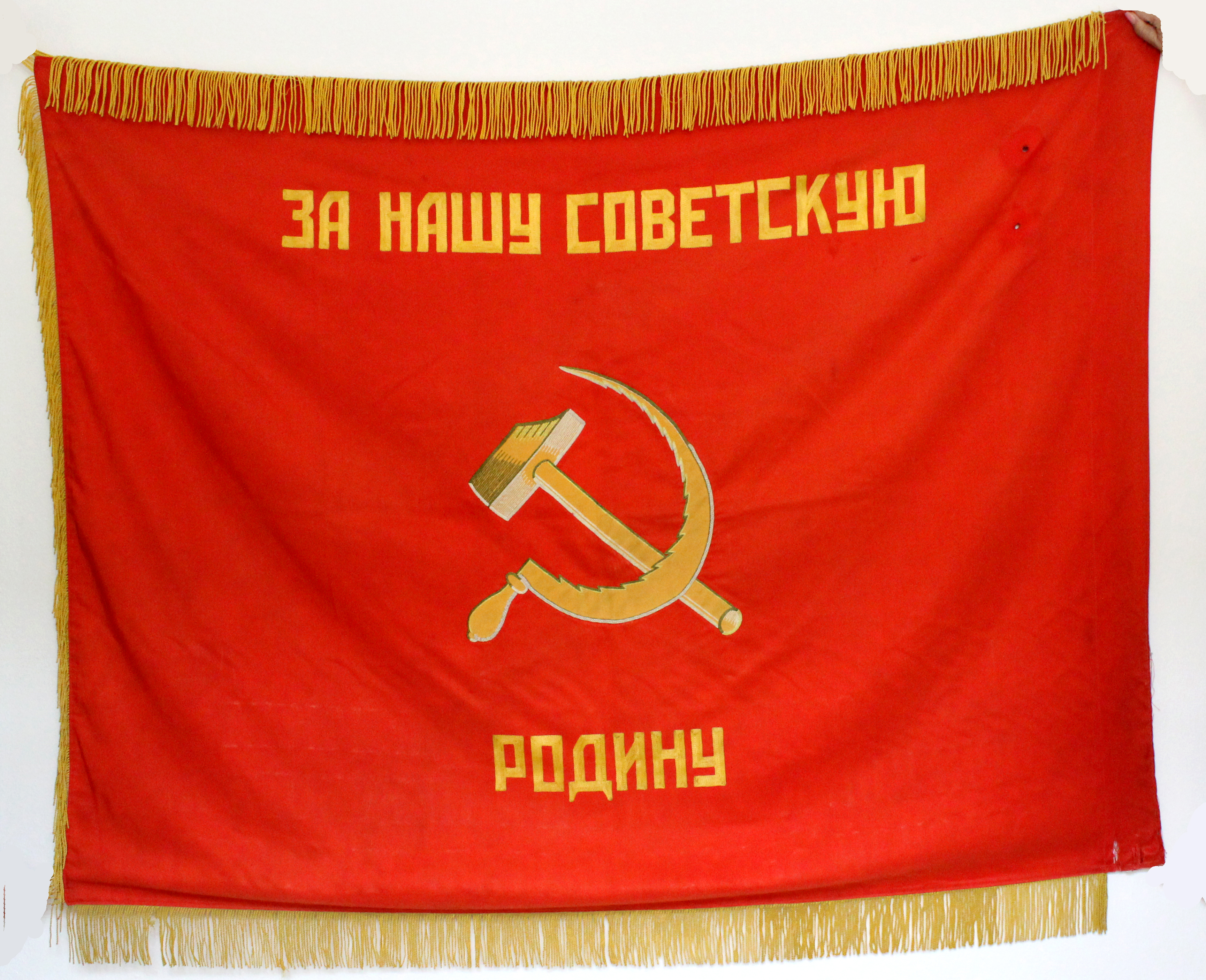 Знамя 154-го отдельного гвардейского батальона связи. Реверс